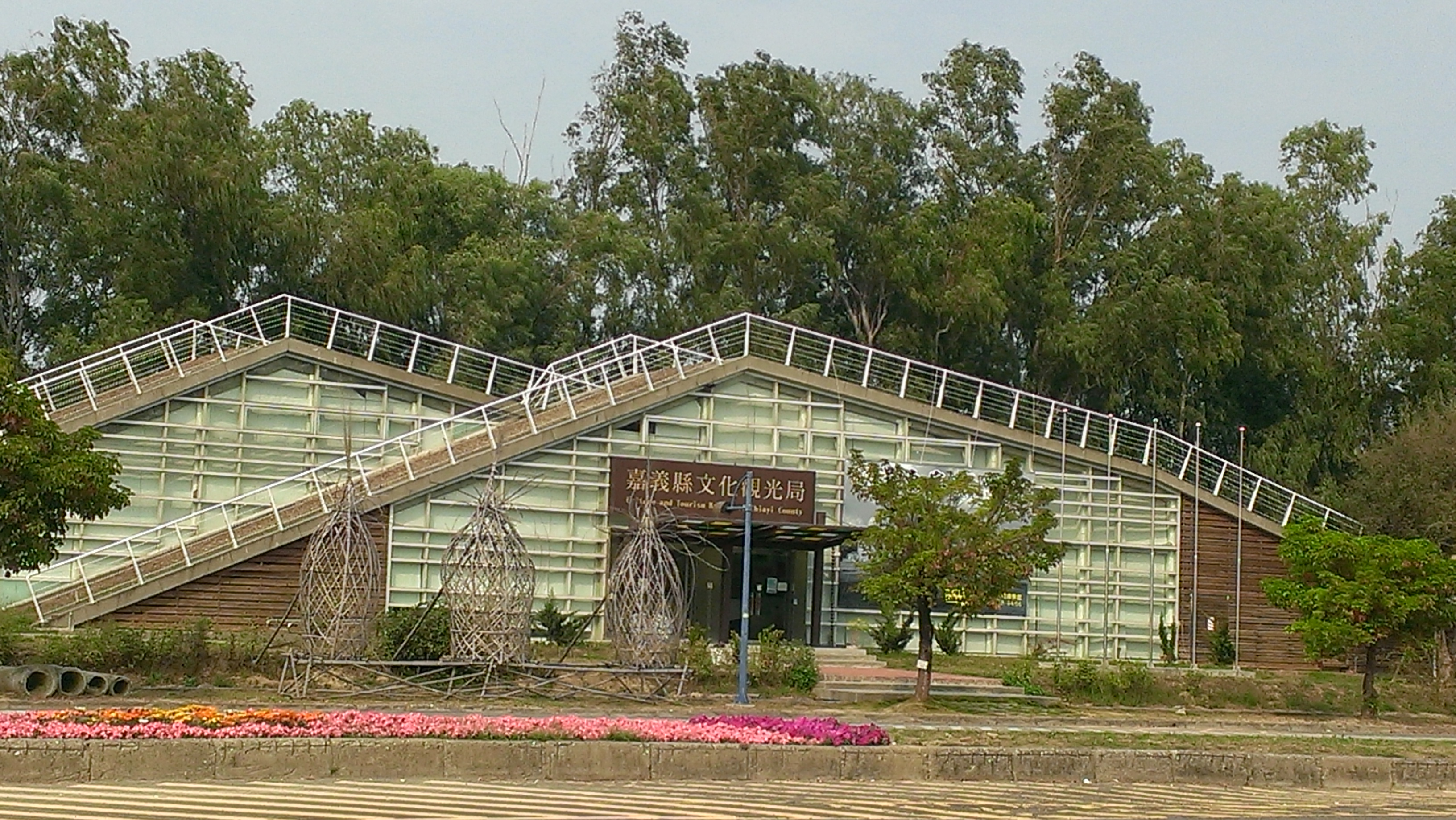 位於嘉義縣太保市故宮大道北側的願景館